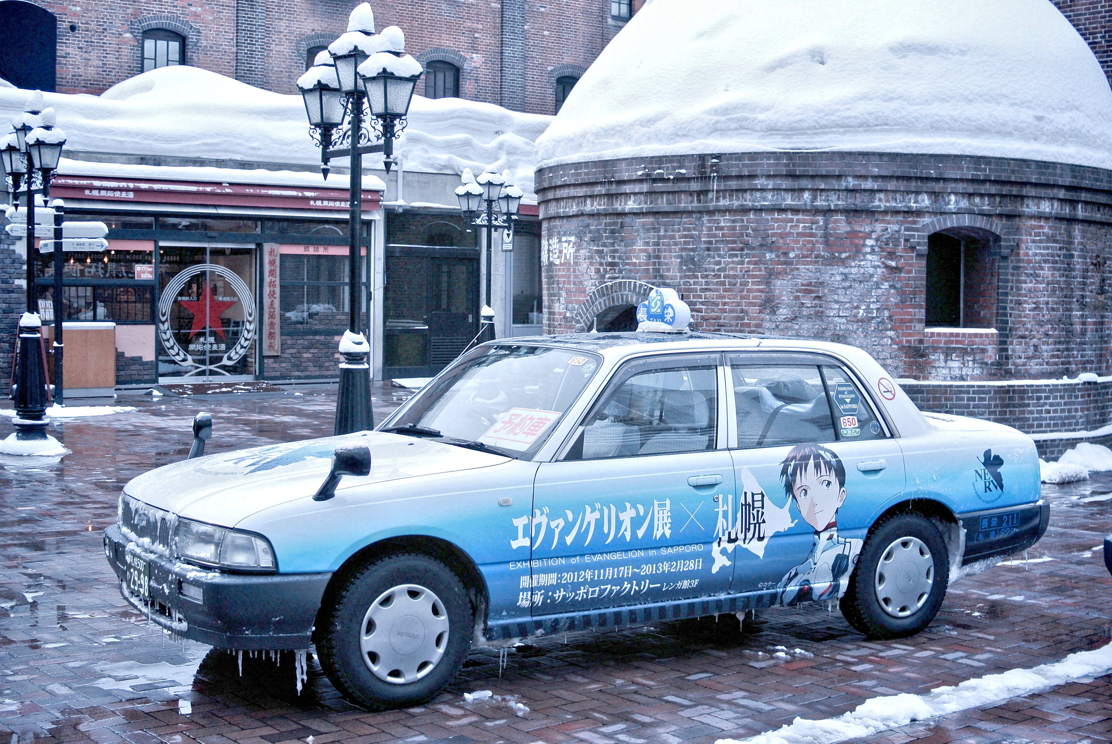 中文（台灣）: 札幌市的日產《新世紀福音戰士》碇真嗣計程車。